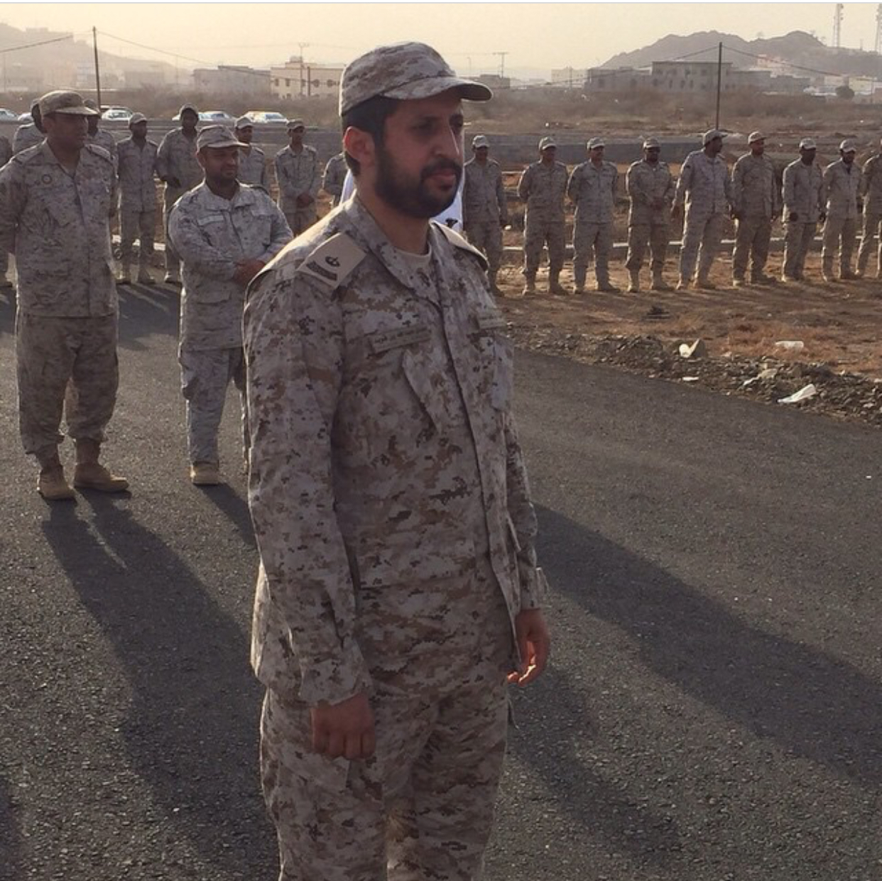 لحظة إستقبال القوات المساندة لعاصفة الحزم بقرية مراح الذئاب